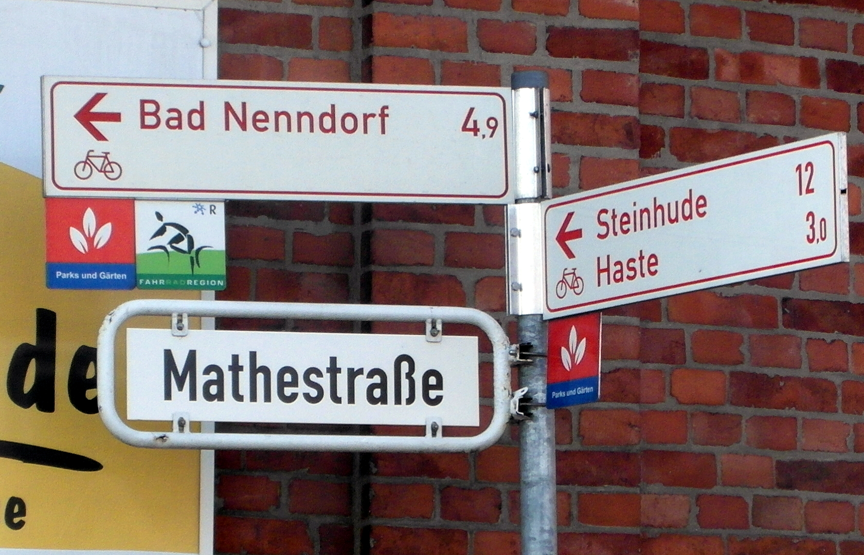 Wegweiser und Straßenschild Mathestraße in Hohnhorst, Landkreis Schaumburg, Niedersachsen